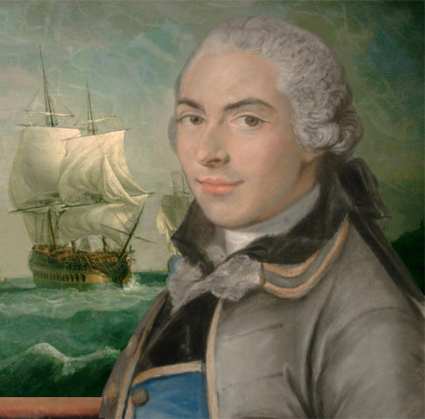 Tableau représentant André-Daniel Laffon de Ladebat en mer.